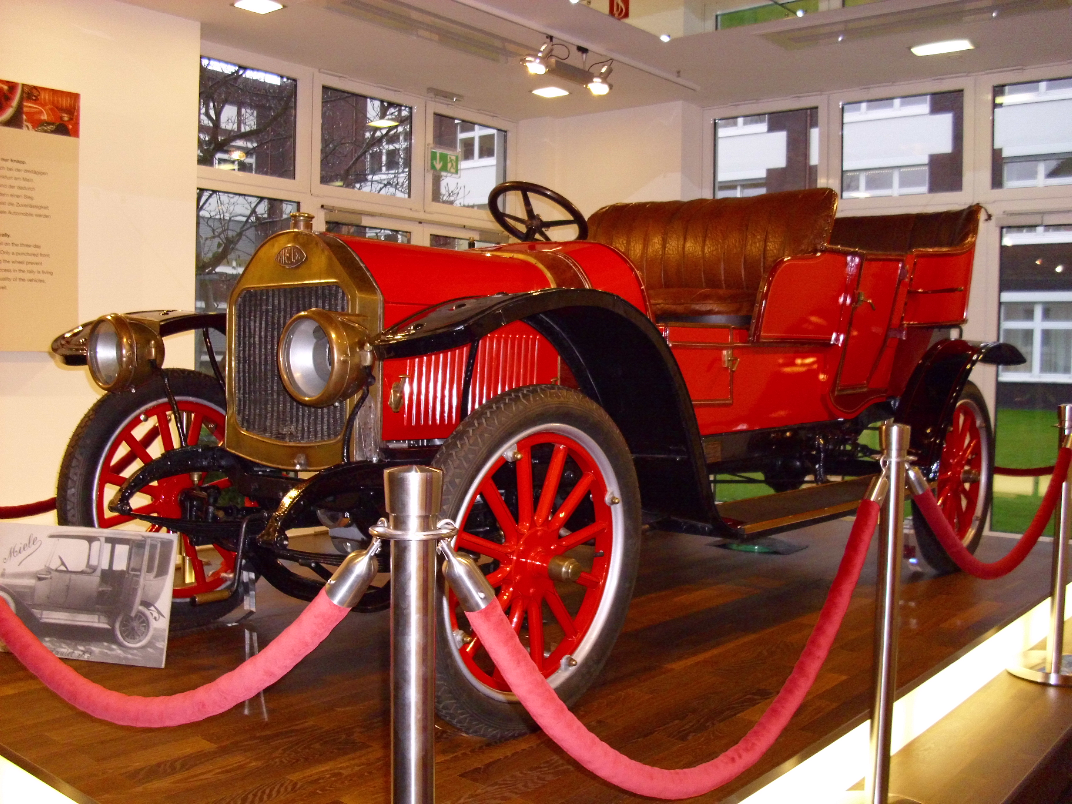 Miele 1913, Miele-Museum, Gütersloh